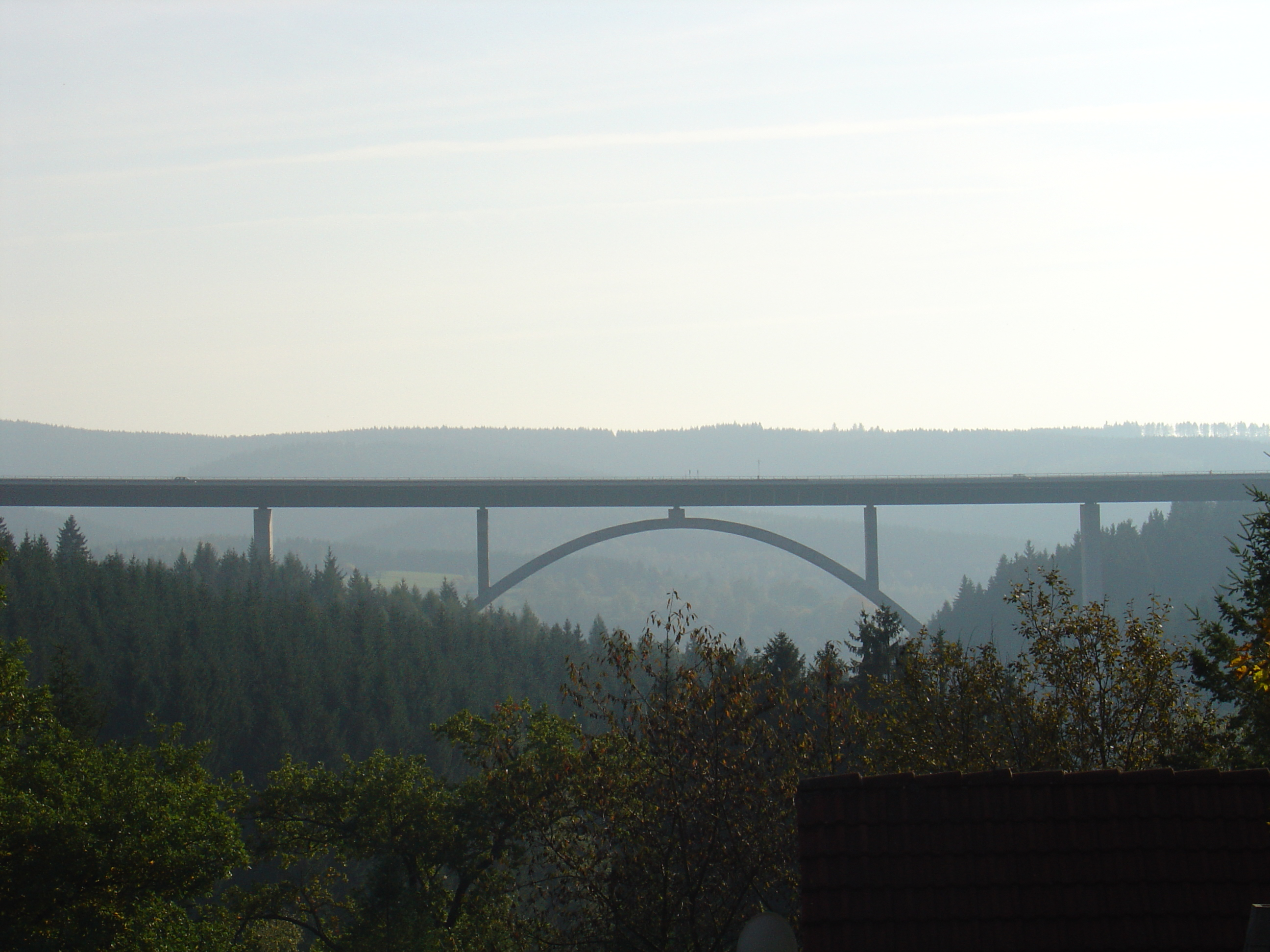 Talbrücke Albrechtsgraben Autobahn A 71 Fotografiert von: Marco Mayer, Germany Datum: 08. Okt. 2005